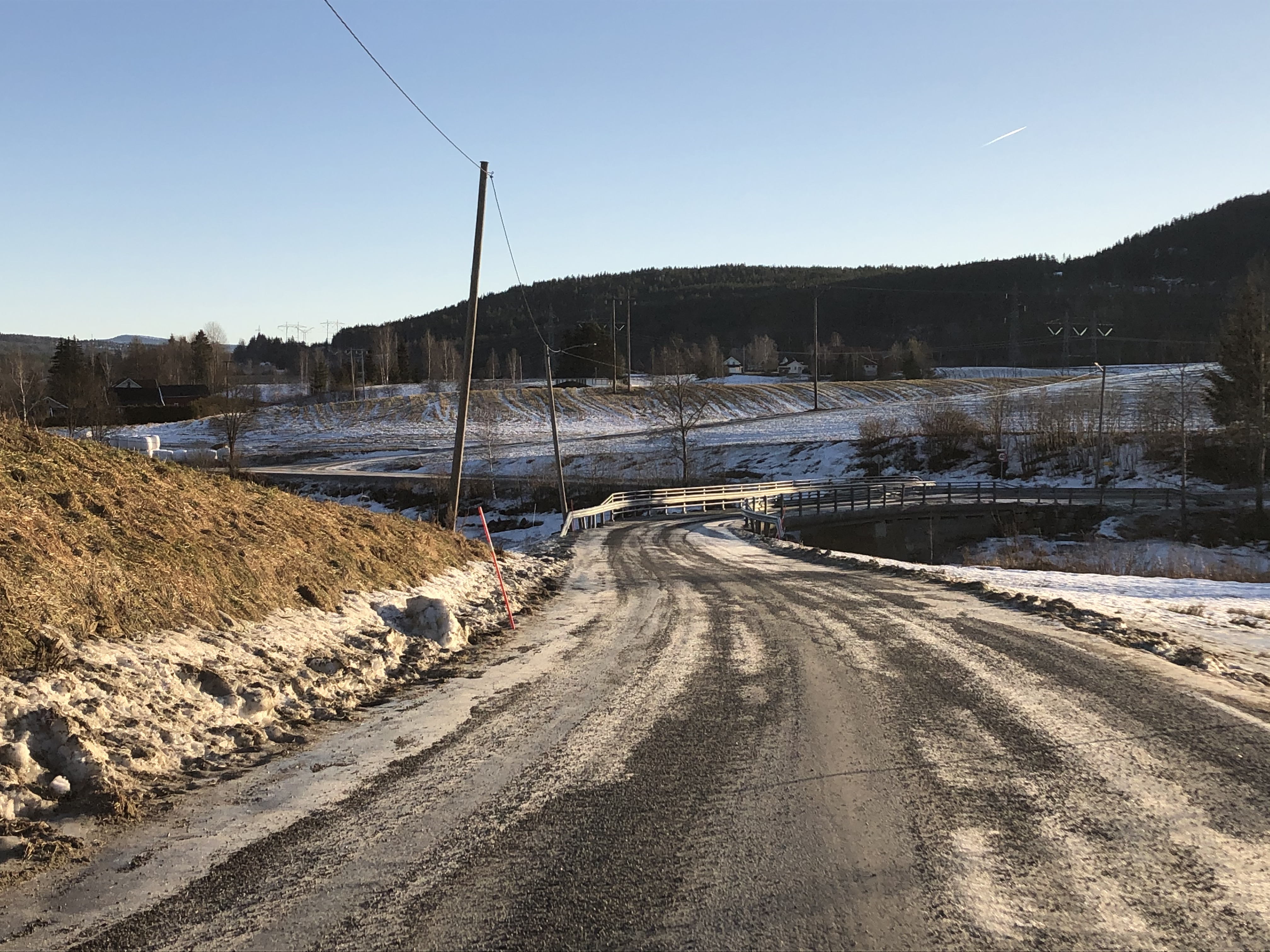 Skotlandveien ved Kvernvollen, Veme, Ringerike